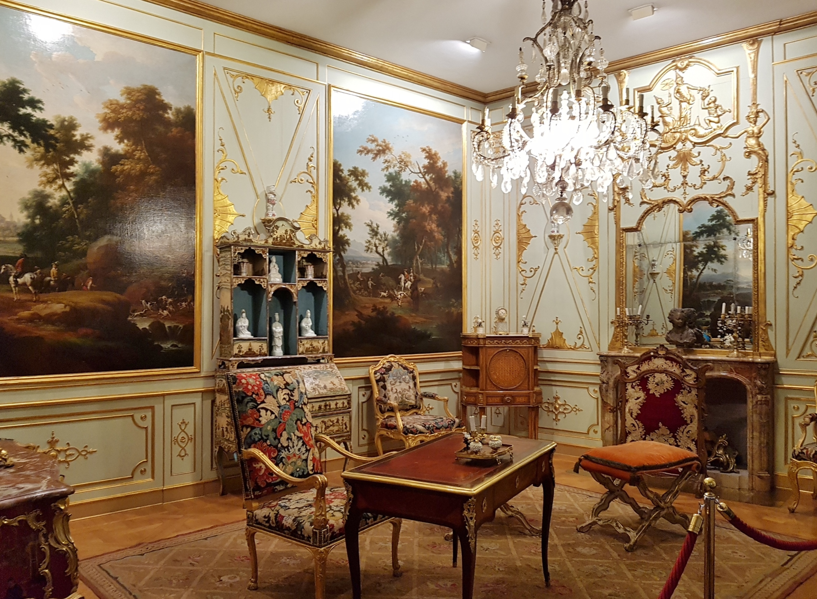 Seconda sala Cignaroli, Museo di Arti Decorative Accorsi–Ometto, Torino